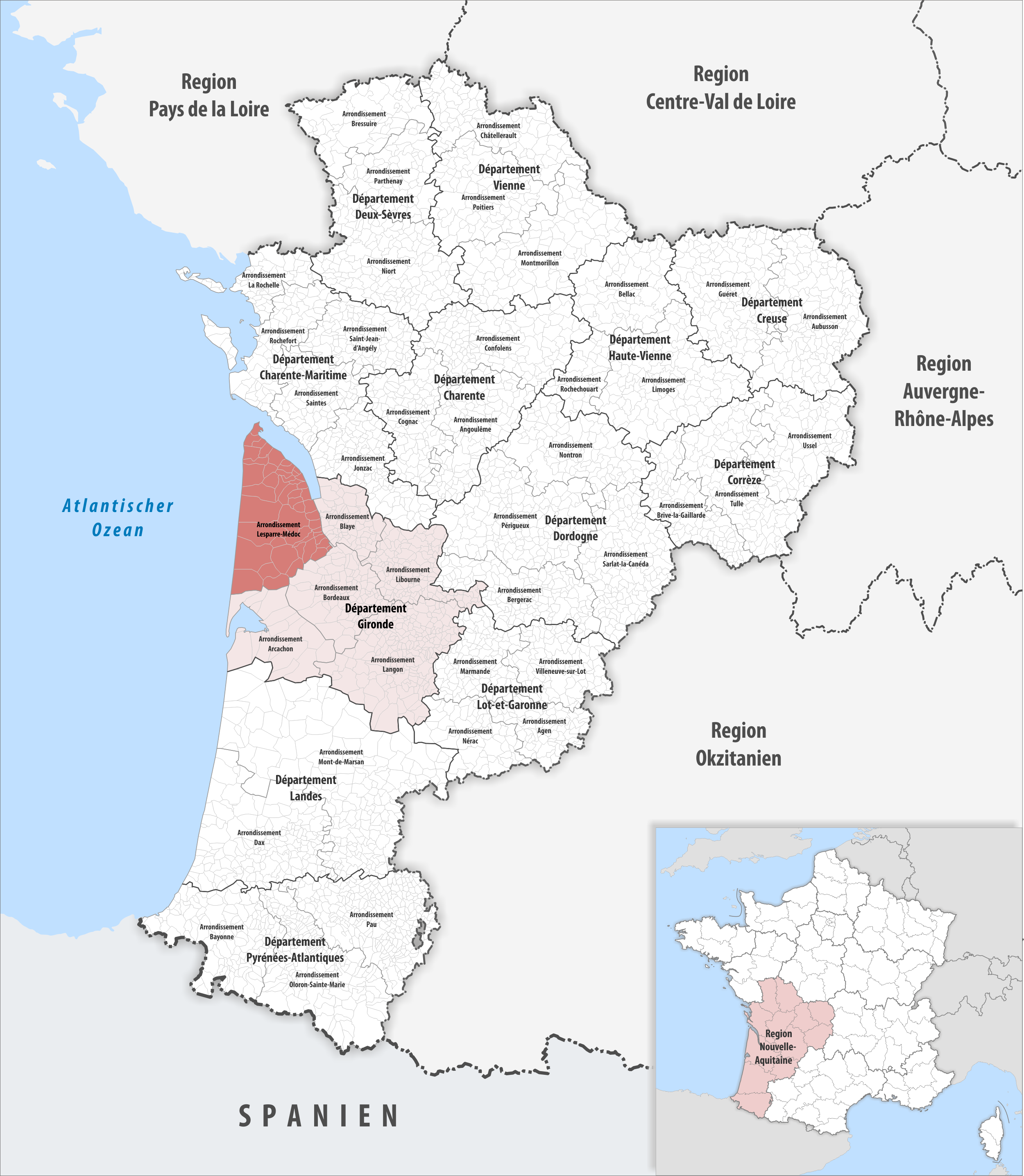 Lage des Arrondissements Lesparre-Médoc